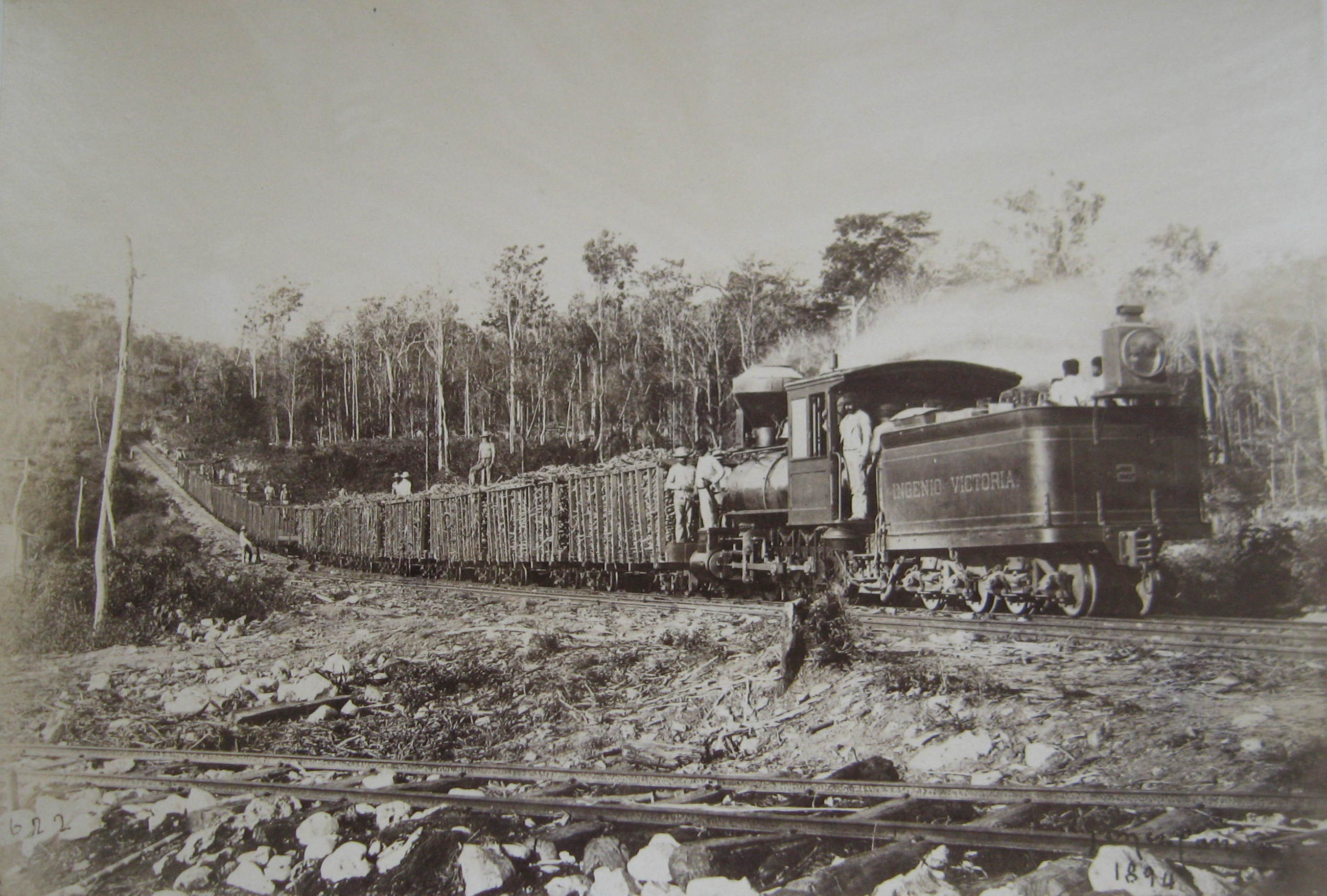 Arthur Koppel - Transport des Zuckerrohrs vom Feld nach der Fabrik, Mexico: Ingenio Victoria Richtigstellung: Es handelt sich wohl um die 2-8-0 Schmalspurbahnlokomotive der Baldwin Locomotive Works (BLW 13021/1892) der Central Victoria Railway bei Yaguajay in der Provinz Sancti Spíritus von Kuba.